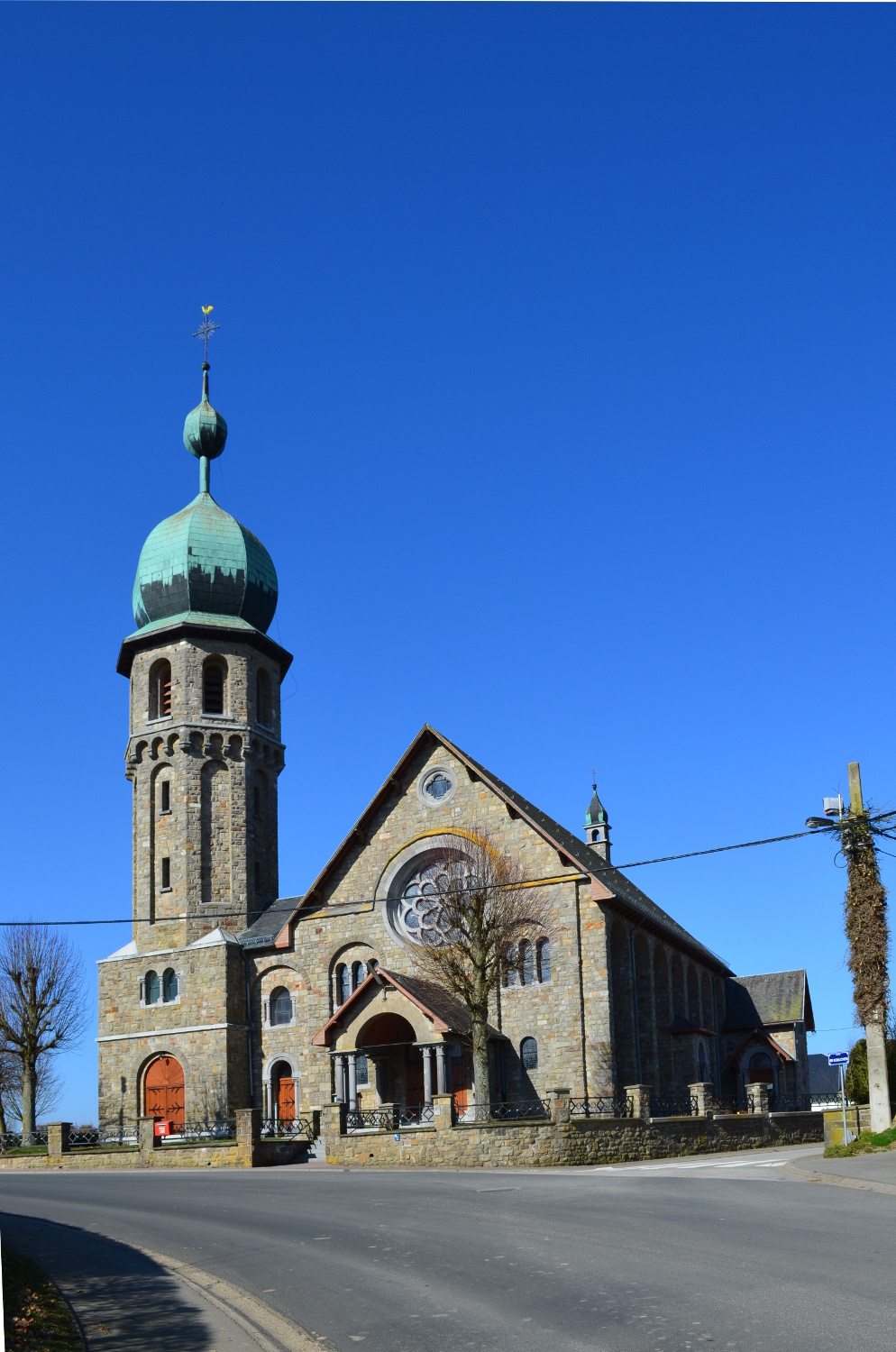 Pfarrkirche Medell